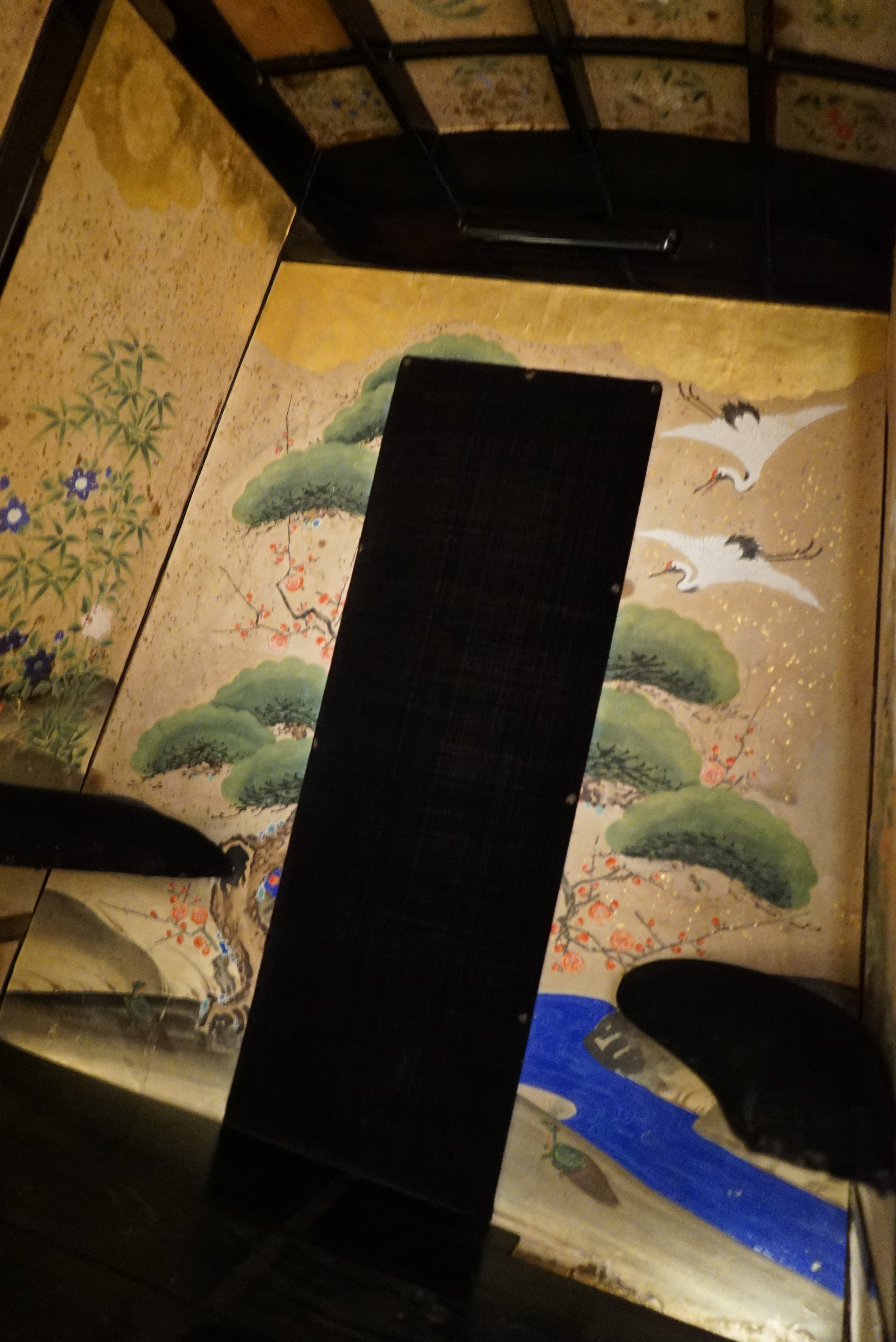 palanquin de mariage de dame à décor maki-e de la collection A. Gérard, restauration en 2018 par le soutient de la direction régionale des affaires culturelles du Grand-Est.